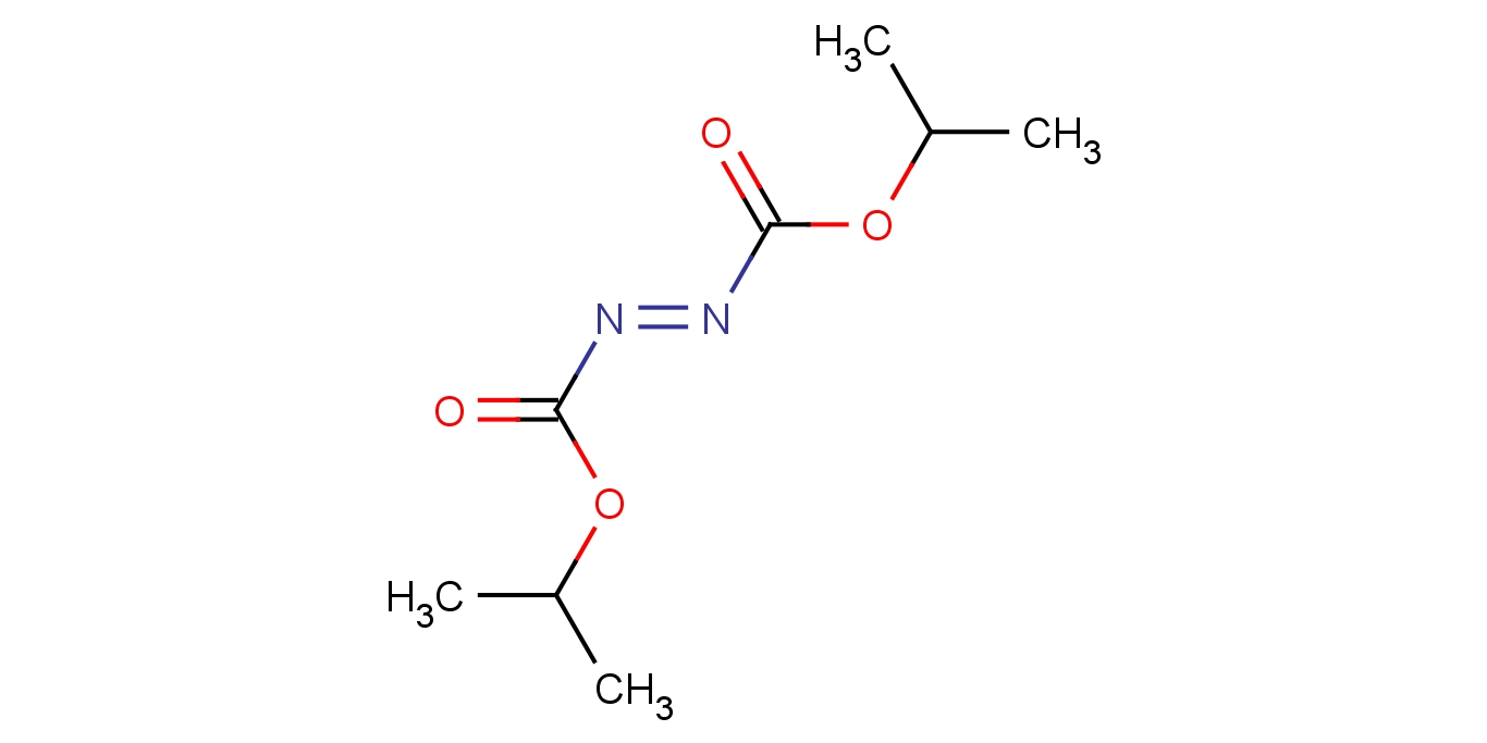 diisopropüülasodikarboksülaat.